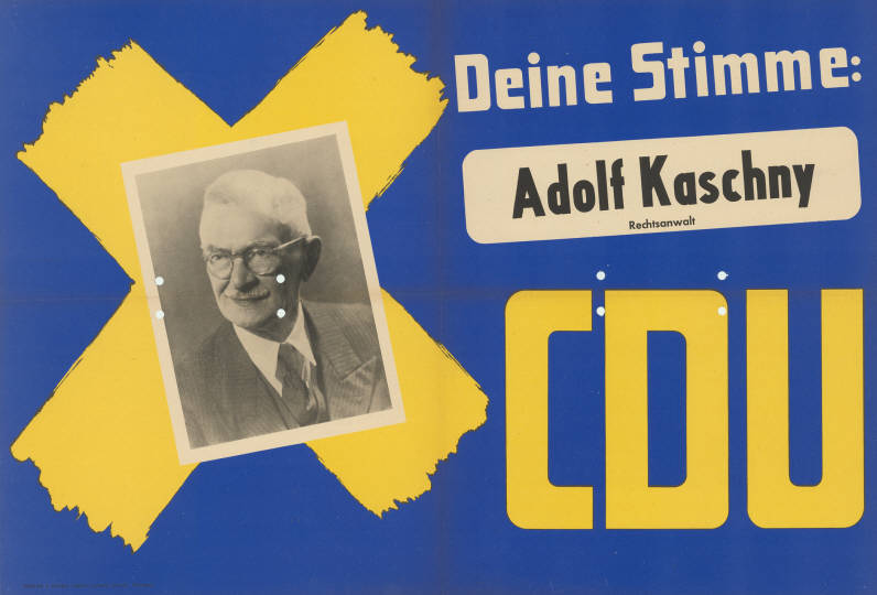 Deine Stimme: Adolf Kaschny Rechtsanwalt CDU Abbildung: Porträtfoto - Stimmkreuz Plakatart: Kandidaten-/Personenplakat mit Porträt Objekt-Signatur: 10-009 : 156 Bestand: Landtagswahlplakate Nordrhein-Westfalen (10-009) GliederungBestand10-18: Landtagswahlplakate Nordrhein-Westfalen (10-009) » Landtagswahl am 18.6.1950 » CDU » mit Porträtfoto Lizenz: KAS/ACDP 10-009 : 156 CC-BY-SA 3.0 DE